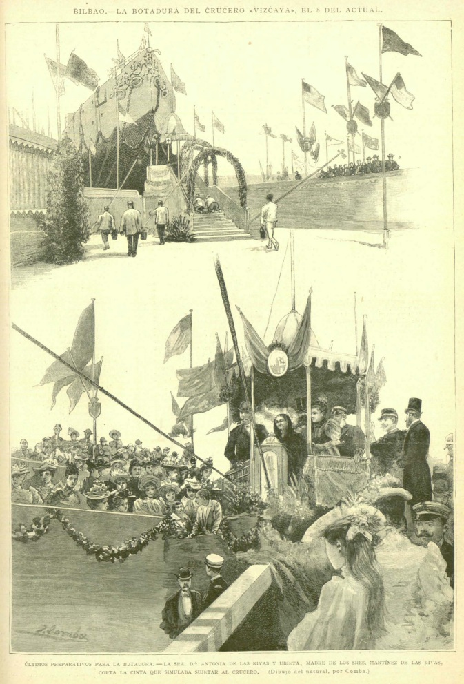 Últimos preparativos para la botadura. La sra. Dª Antonia de las Rivas y Ubieta, madre de los señores Martínez de las Rivas corta la cinta que simulaba sujetar al crucero. Dibujo al natural de Comba, grabado de Rico.